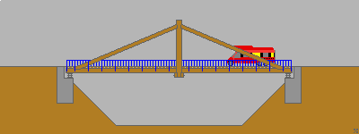 Hängesprengwerk